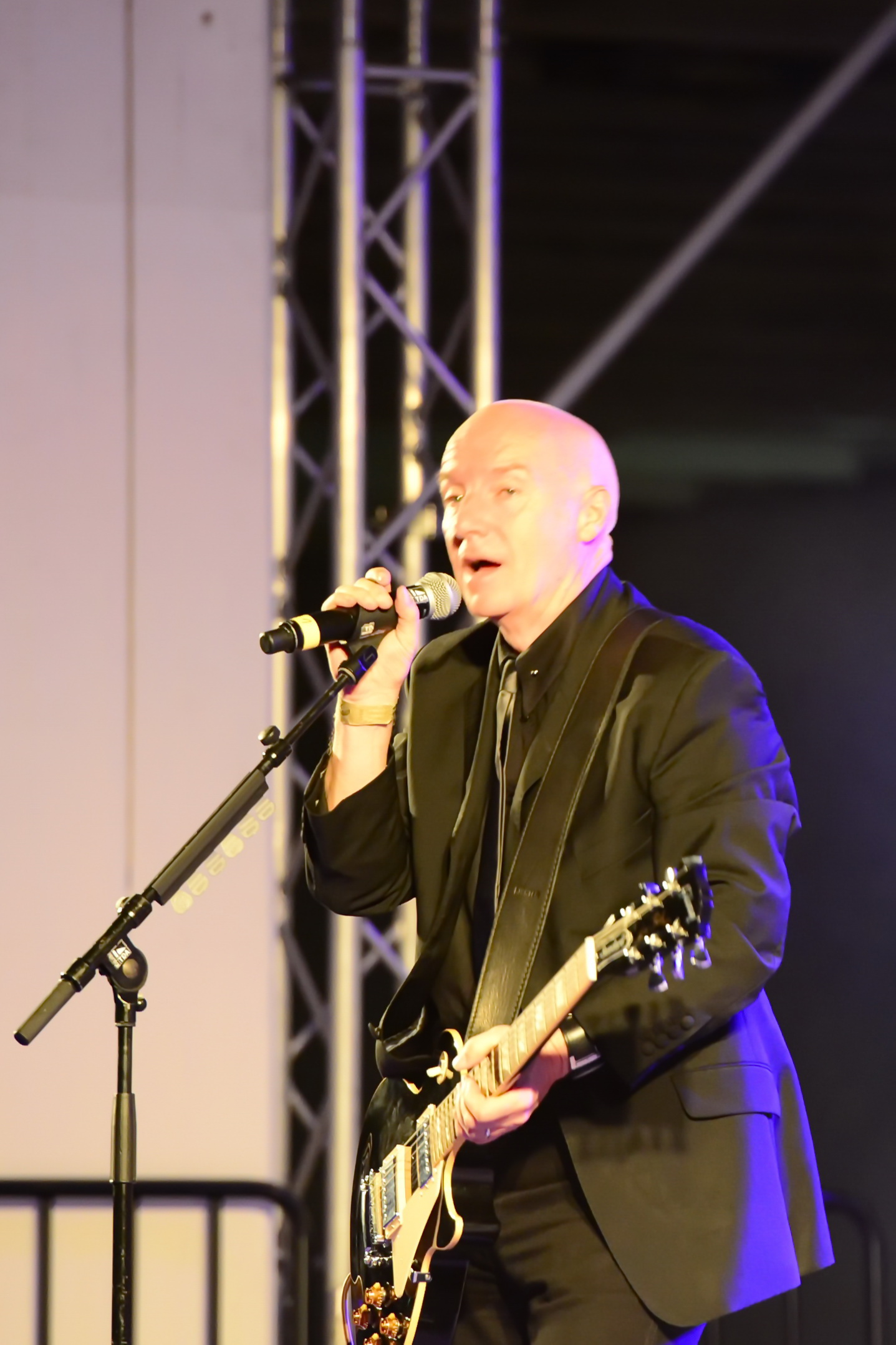 Midge Ure (singer and songwriter of Ultravox), Amphi festival 2014